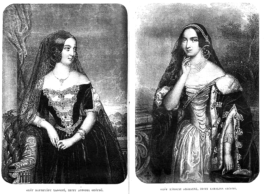 Zichy Antónia (Cziffer, 1816. július 14. – Dáka, 1888. szeptember 28.) és Zicsi és vásonkeői gróf Zichy Karolina (Pozsony, 1818. november 8. – Budapest, 1903. január 30.) Zichy Károly és Batthyány Antónia gyermekei